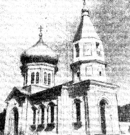 Церковь Св. Марии Магдалины в хуторе Поляковка, Таганрогский округ Области Войска Донского.